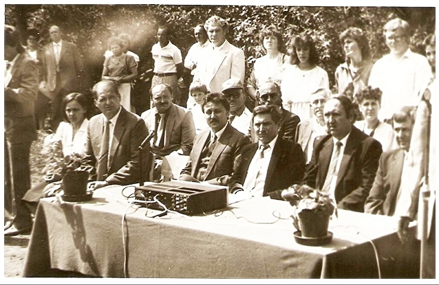 A szakközépiskola tanárai